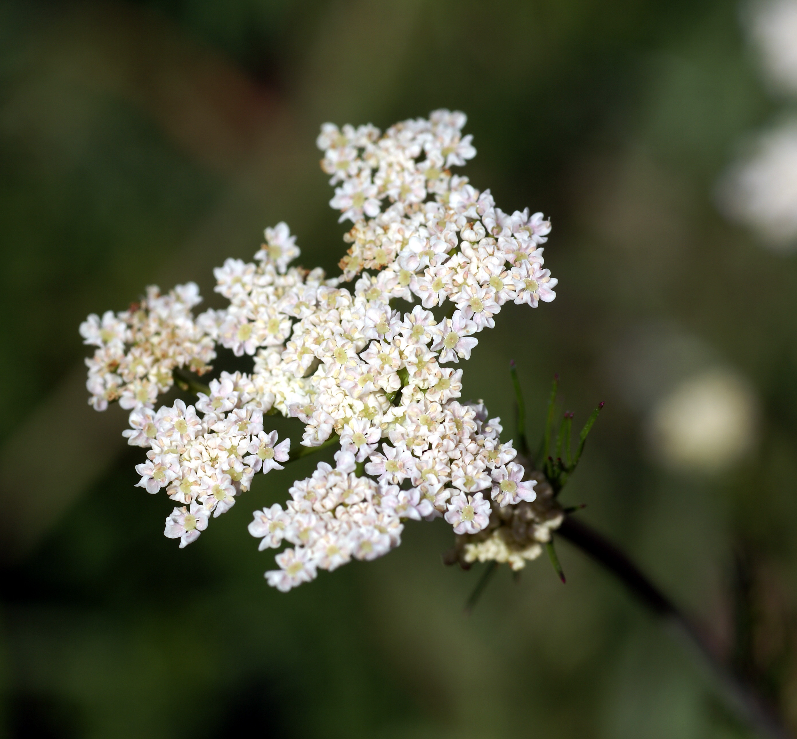 Plant species Carum carvi.